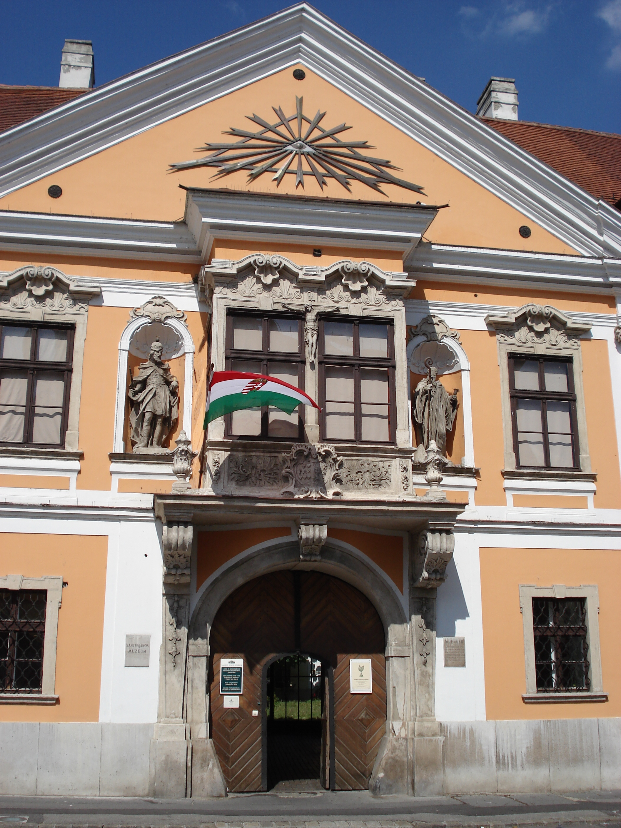 Györ, Abthaus